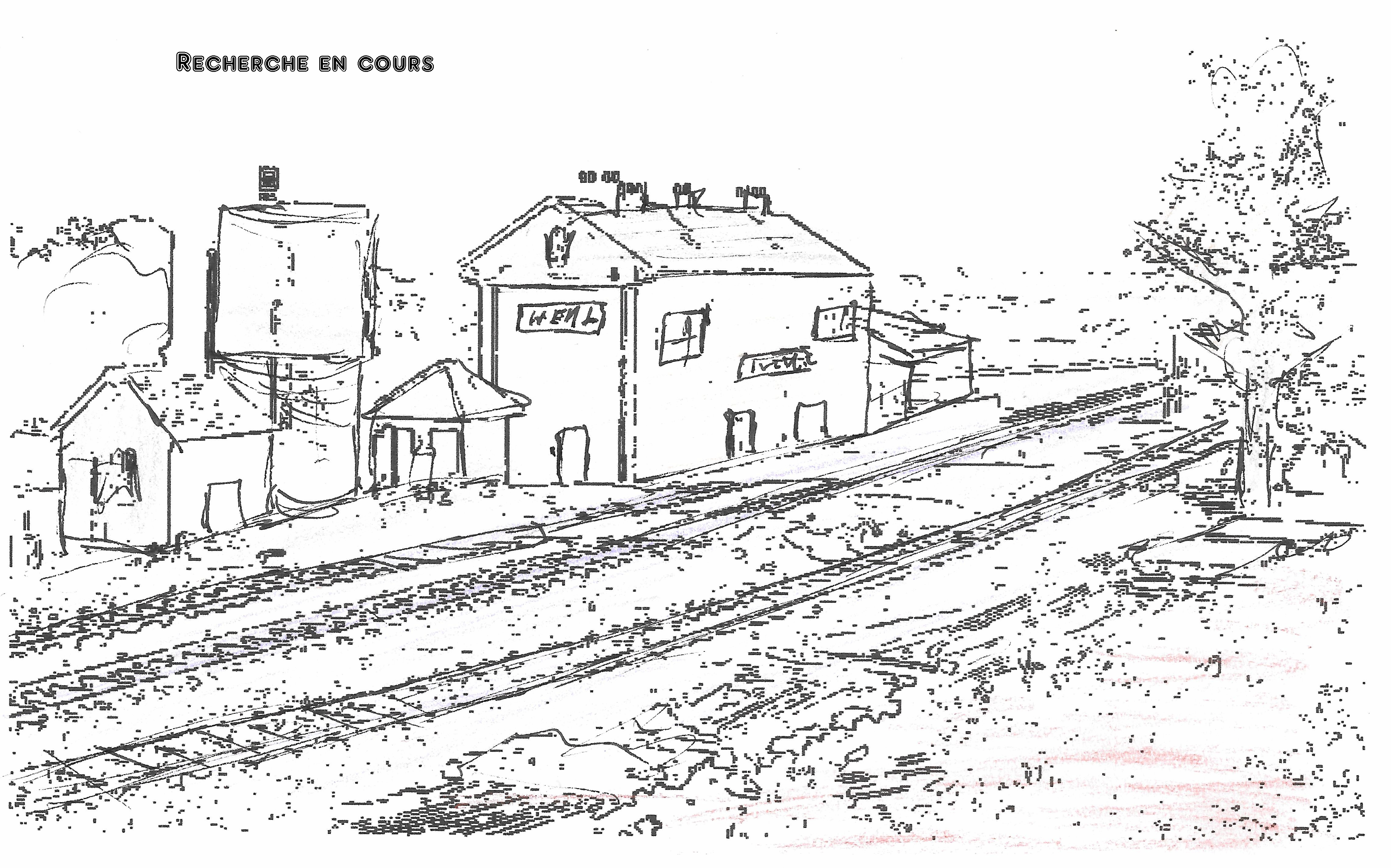 Gare ancienne NB